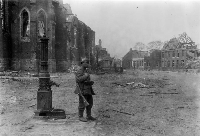 Marktplatz Aubers Kriegsphotograph W. Braemer, Berlin